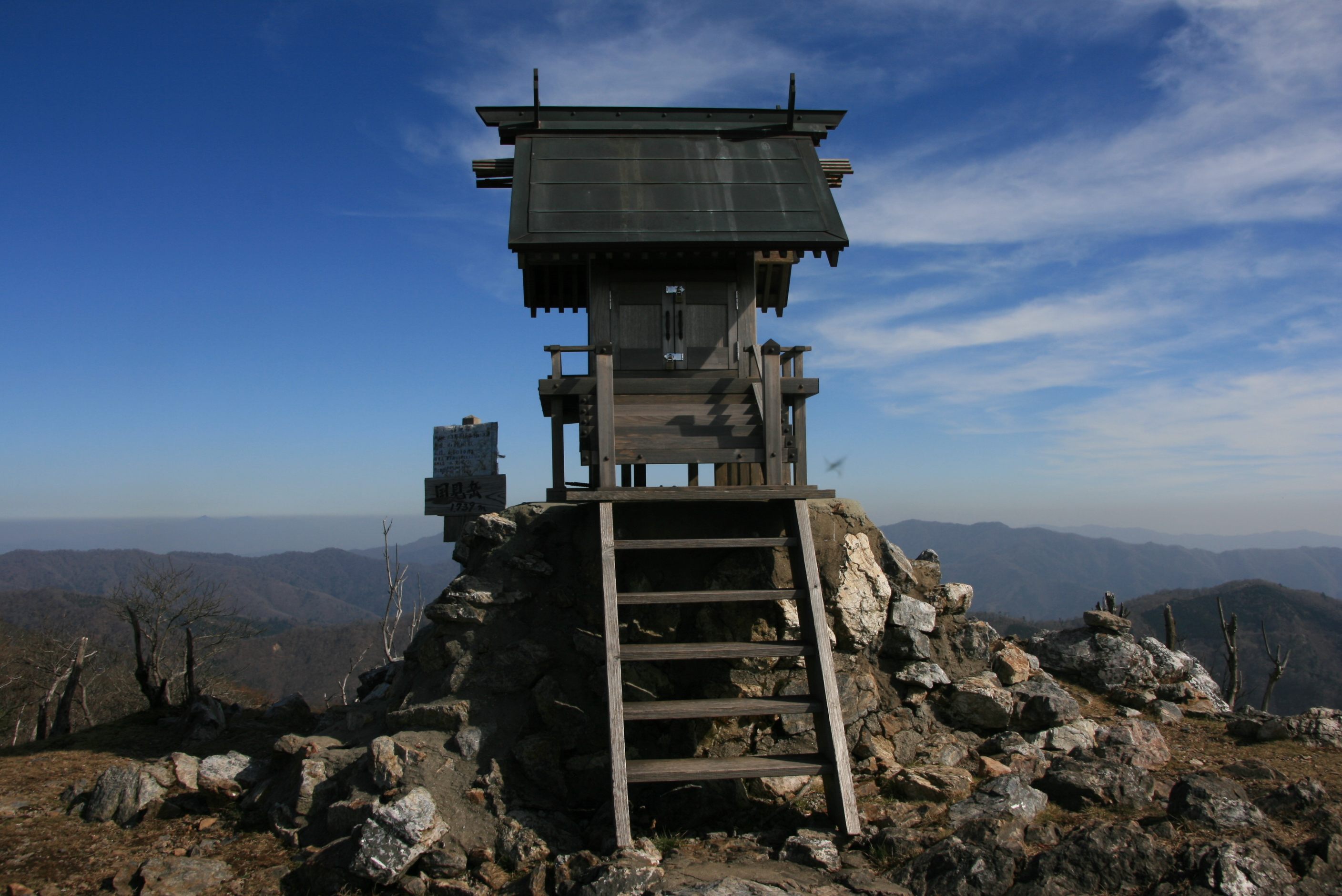 国見岳山頂の祠。